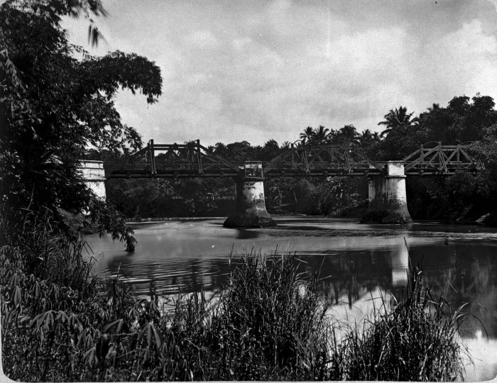 Foto. Riviergezicht met spoorbrug over de Bantam rivier.